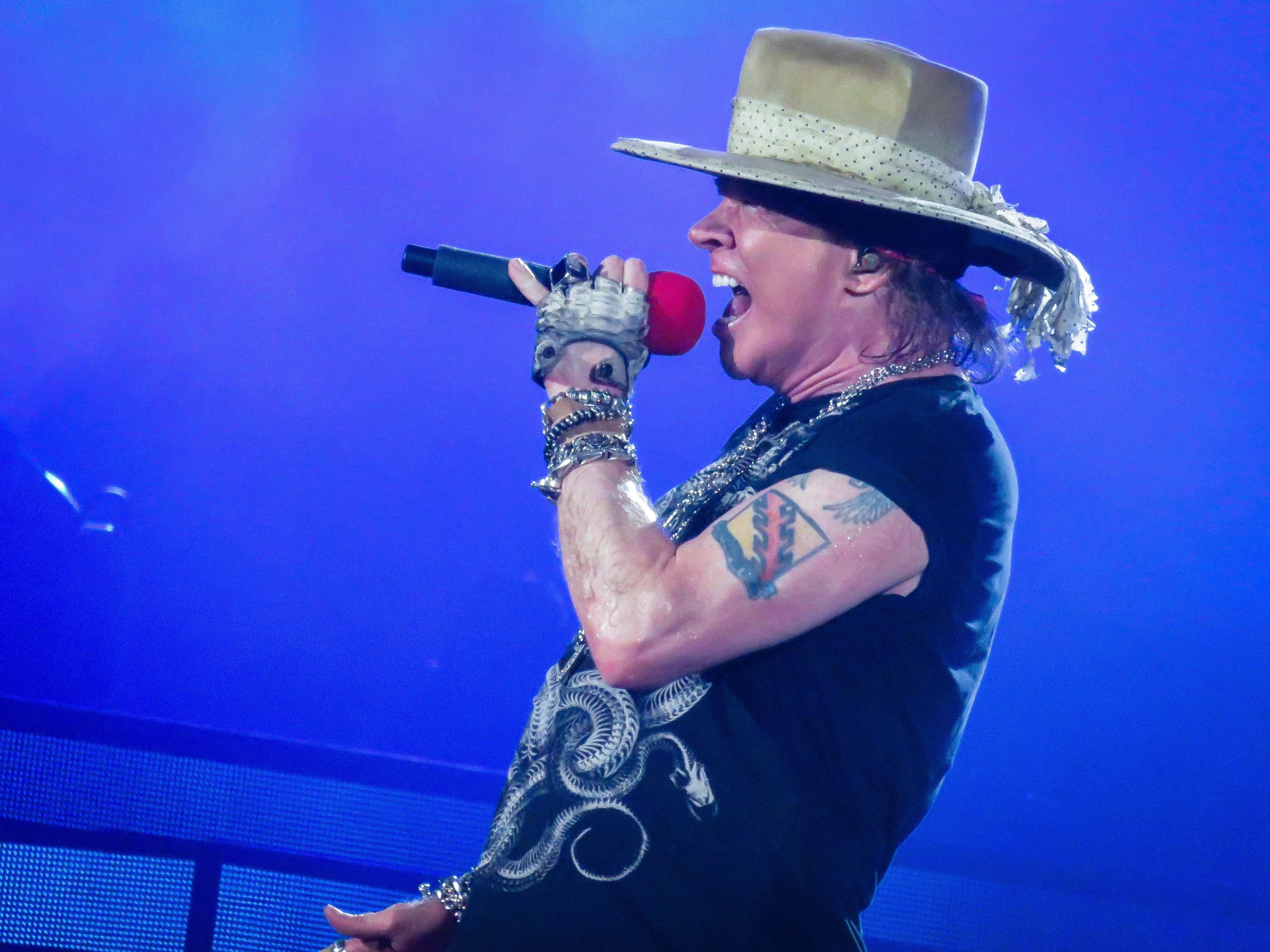 Guns n´Roses Palacio de los Deportes 30/11/2016